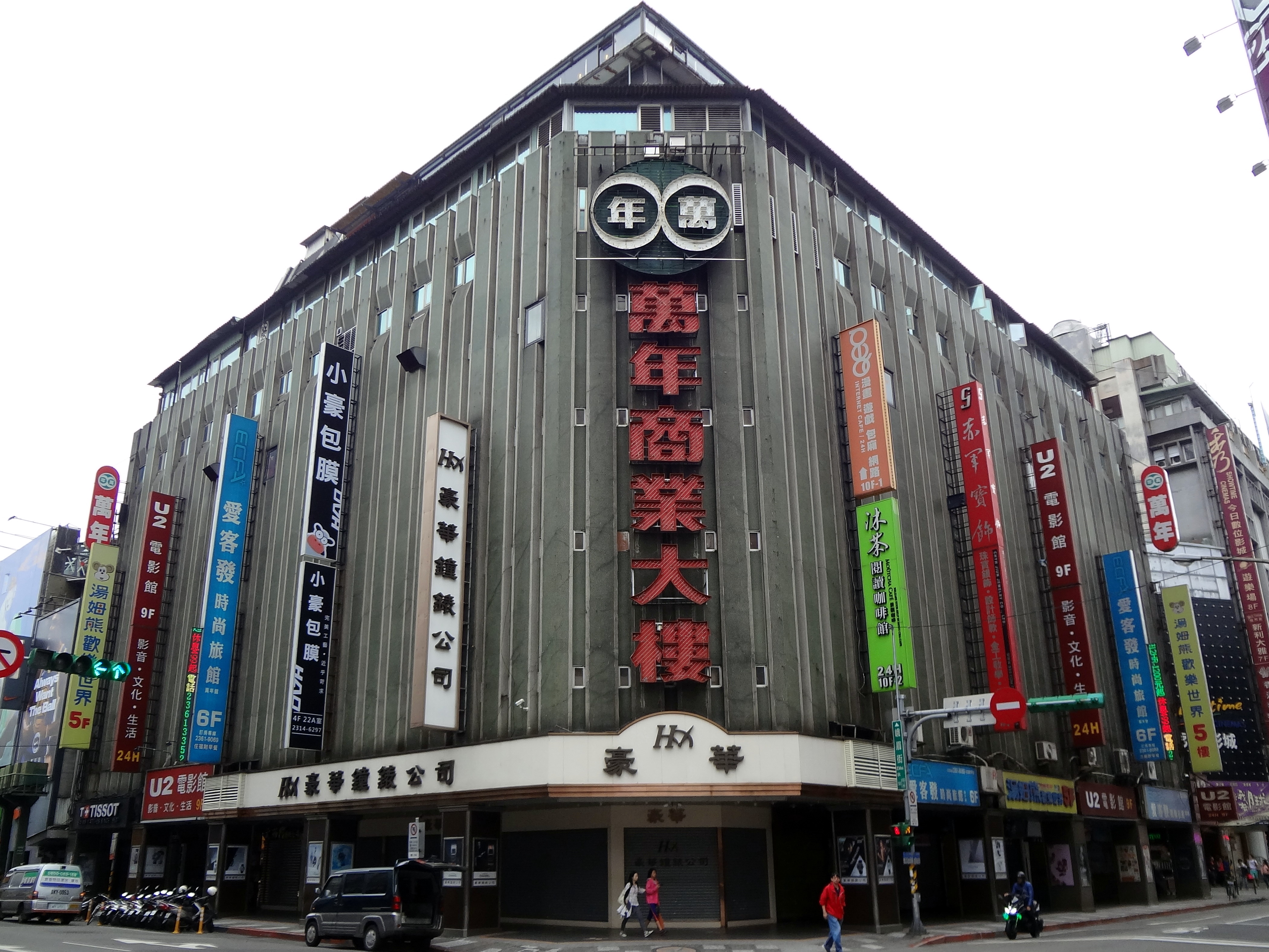 萬年商業大樓東北角正面全景。